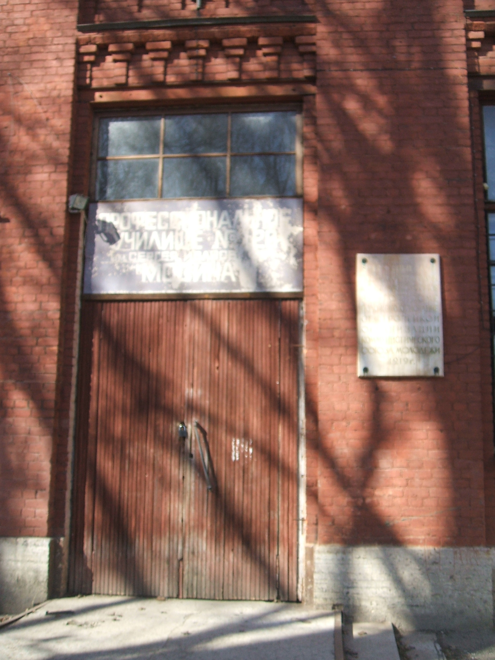 Сестрорецк СПб. Вход в историческое здание ФЗУ (ПТУ-120)